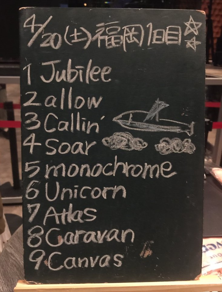 amiinAセトリボード